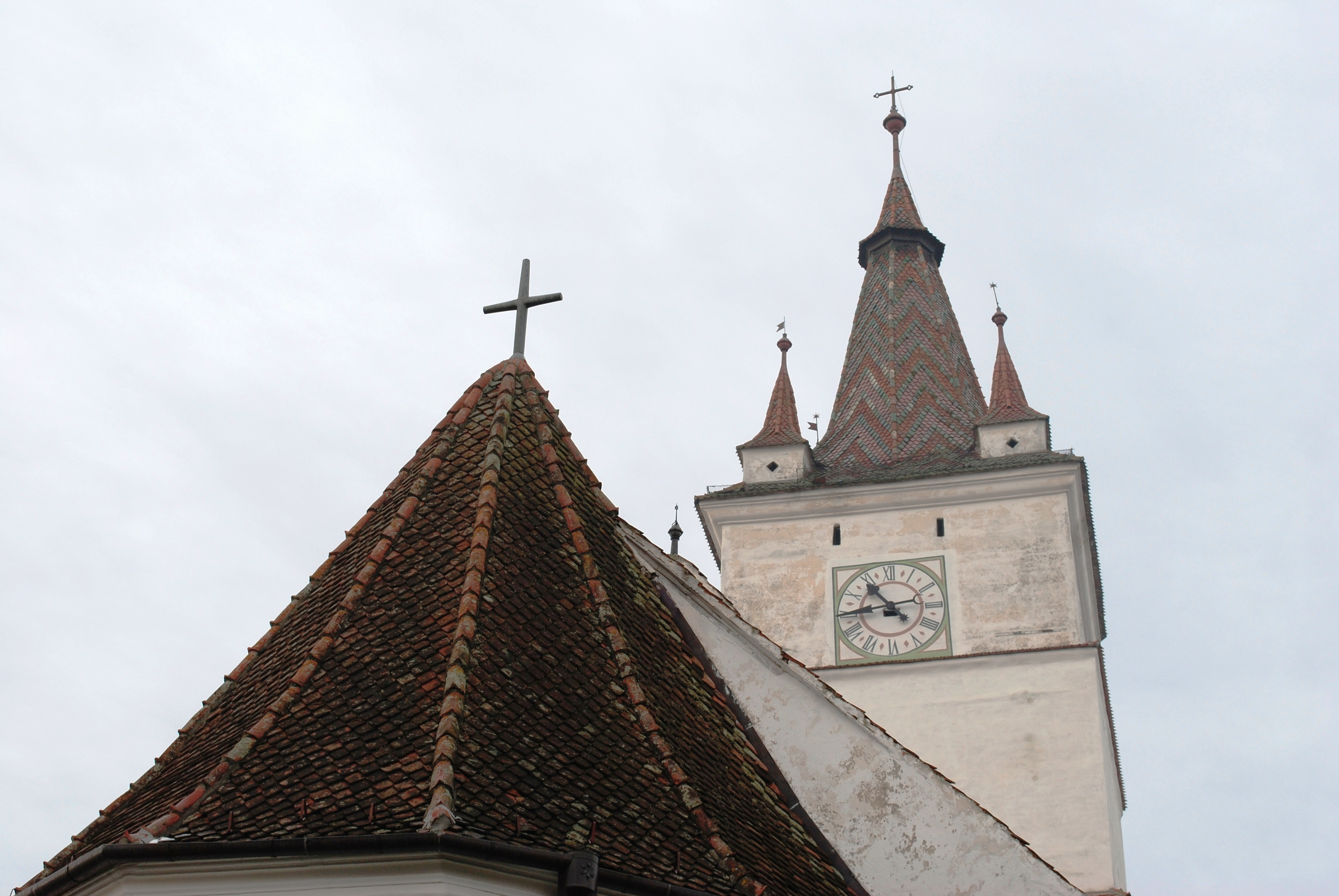 Ansamblul bisericii evanghelice fortificate, sec. XIII - XVIII